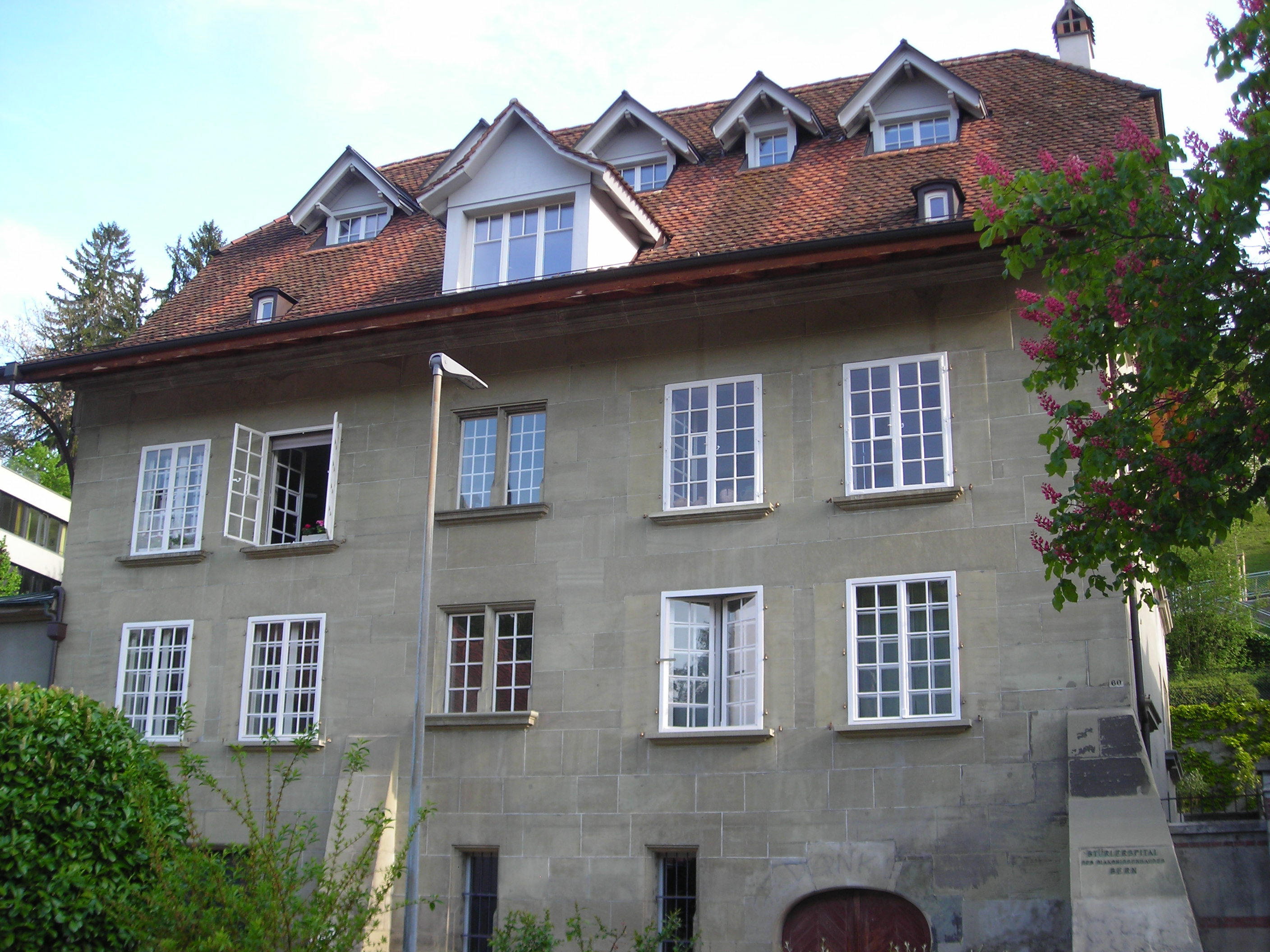 Stürlerhaus Südseite, Bern, Switzerland